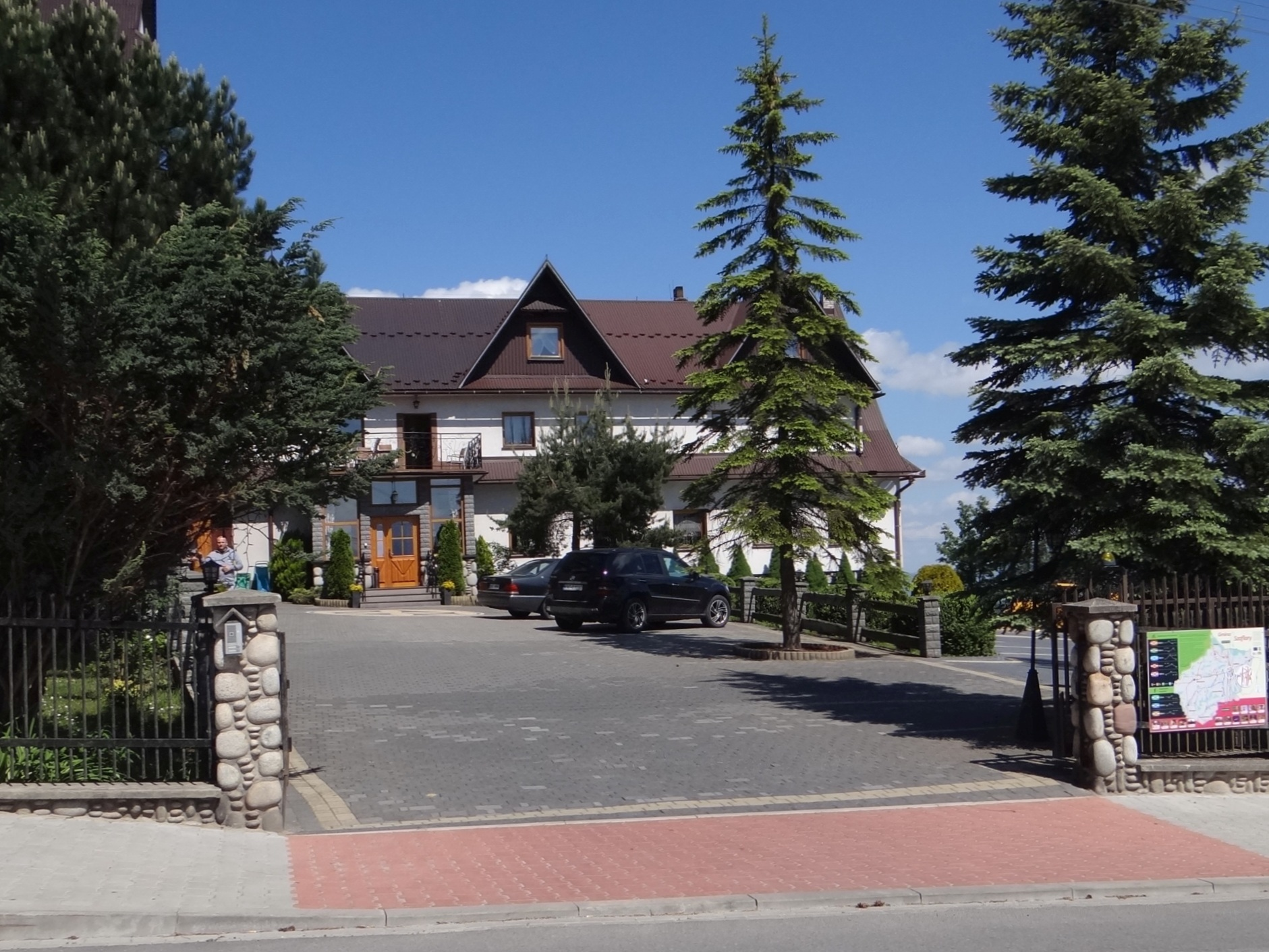 Bańska Wyżna